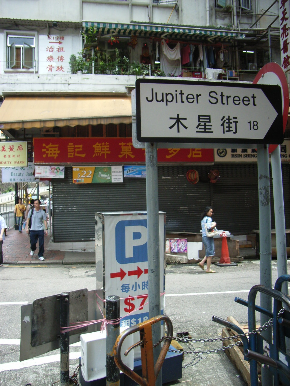 天后木星街, Jupiter Street in Tin Hau district, Hong Kong User:Tin Ho SP Lim